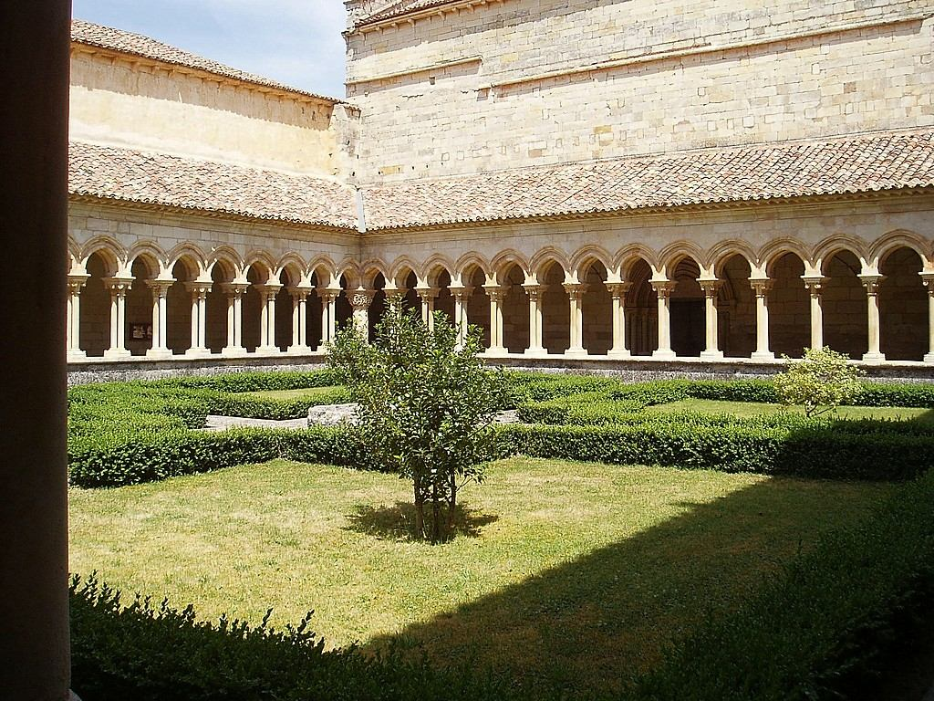 Claustro del Monasterio de San Andrés del Arroyo, Santibáñez de Ecla (Palencia)